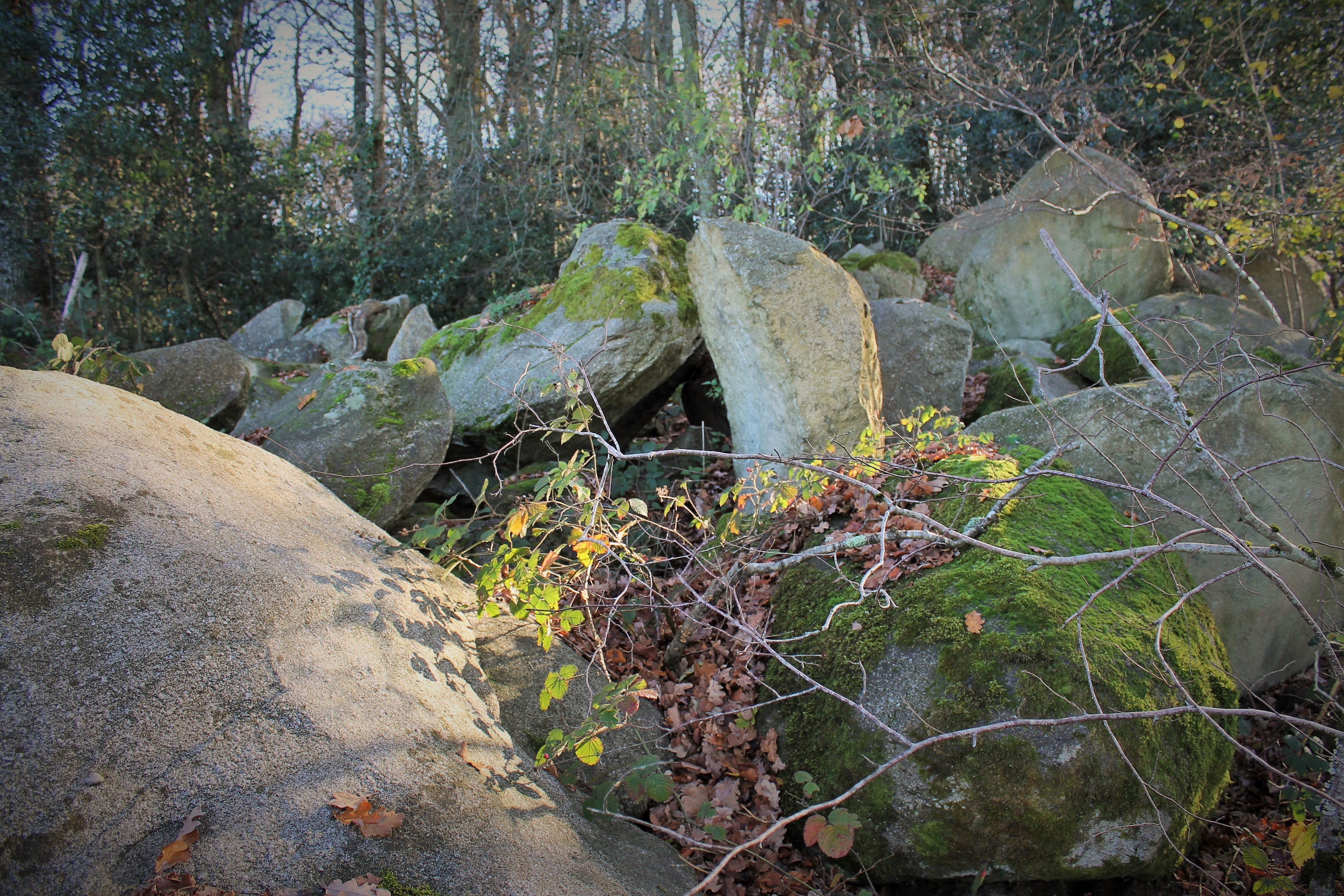 Pour les randonneurs empruntant le chemin des maçons